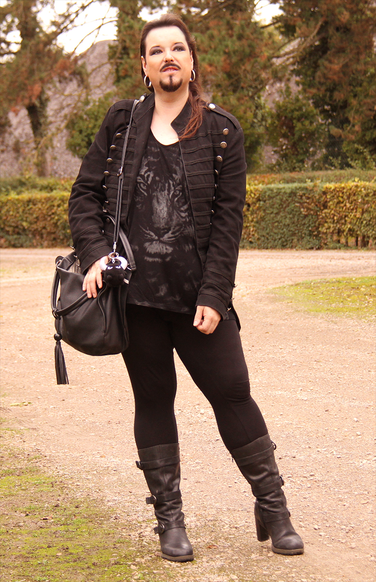 Homme en bottes, style Alternatif. Bottes Dr martens.